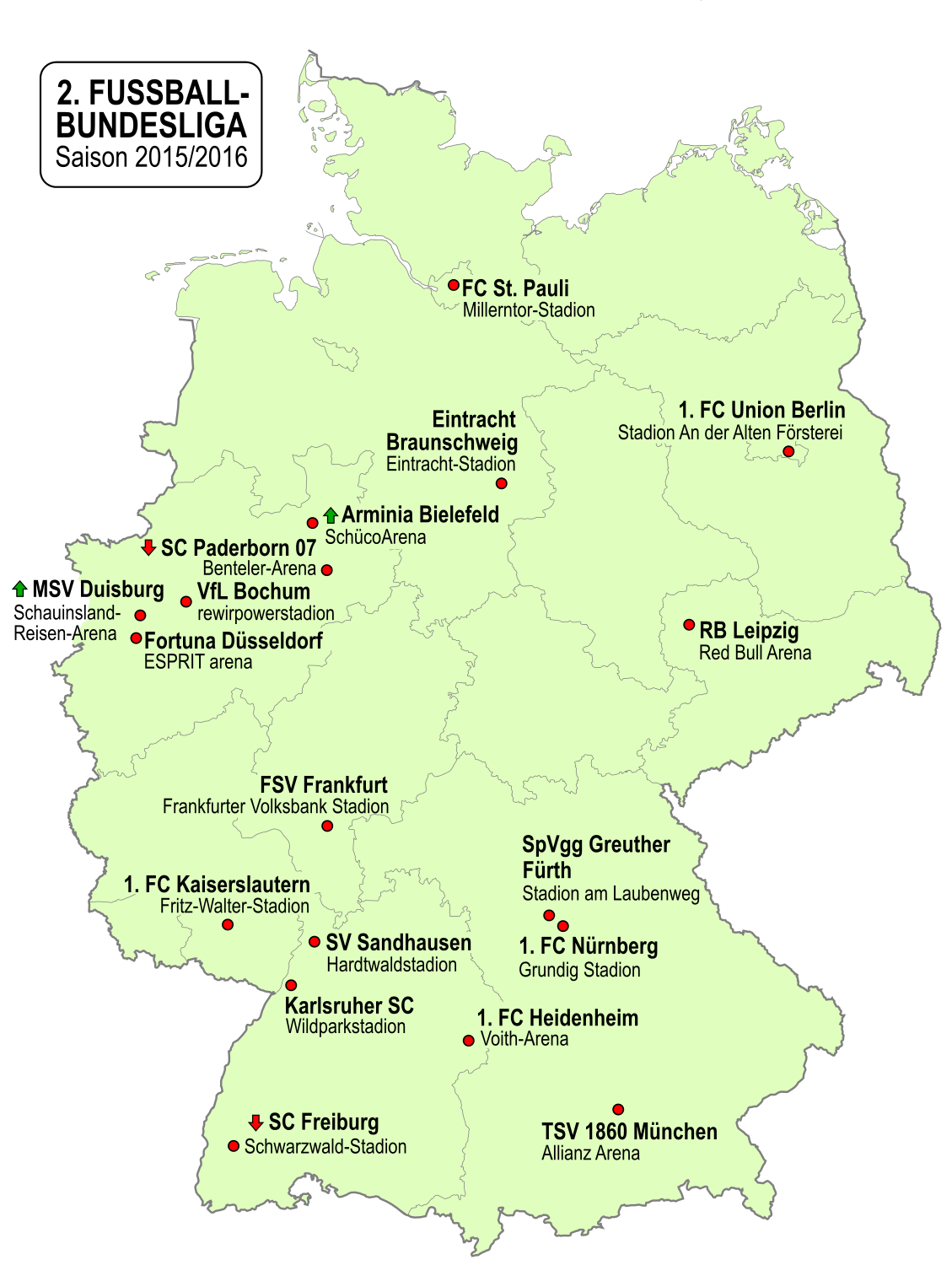 Karte der Vereine der 2. Fußball-Bundesliga-Saison 2015/2016